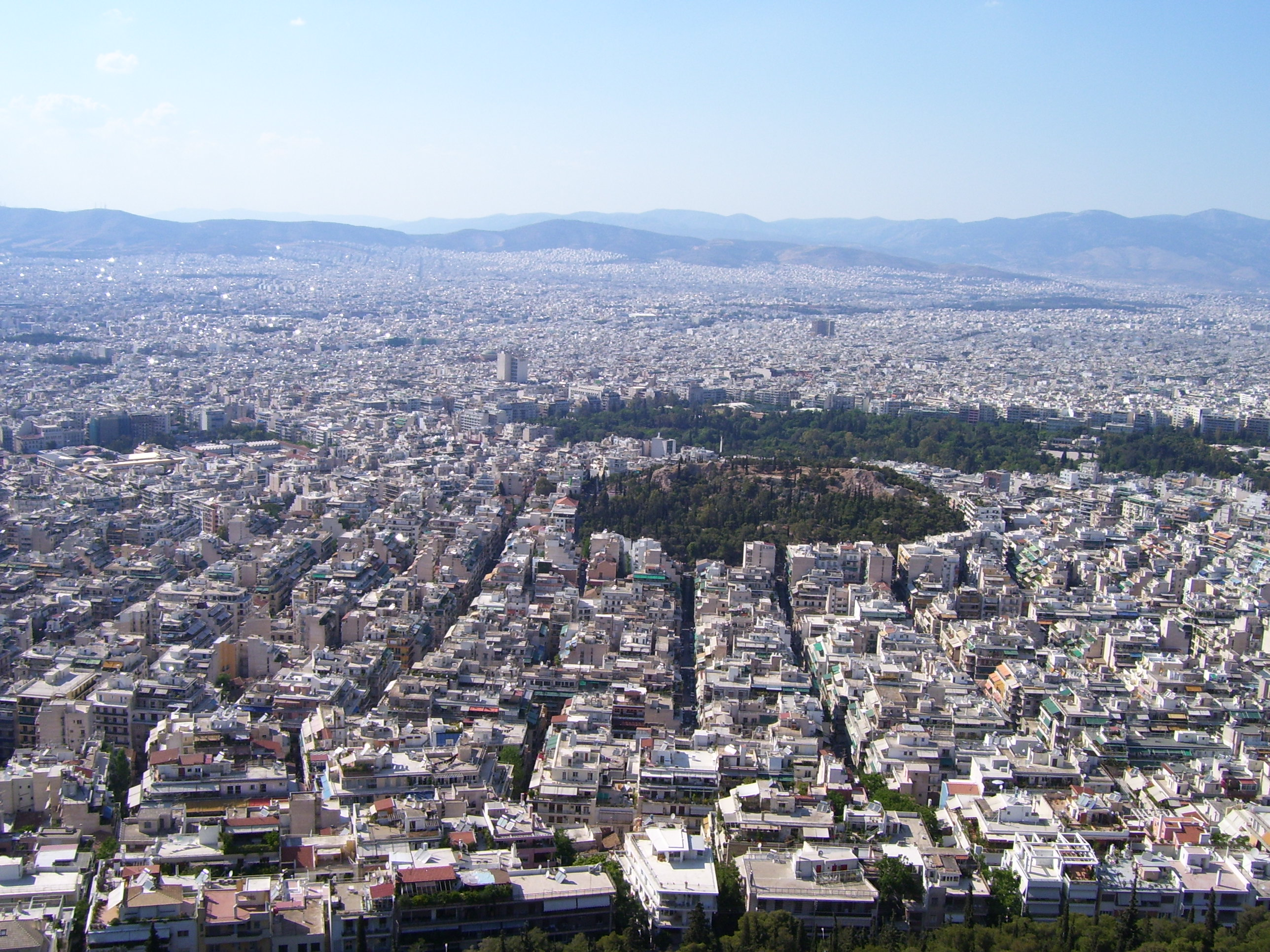 Vue d'Athènes en direction du nord-ouest, sur les quartiers d'Exarcheia et Neapoli (au pied du Mont Lycabette), la colline Strefi (au centre) et le Champ de Mars (Pedion Areos)